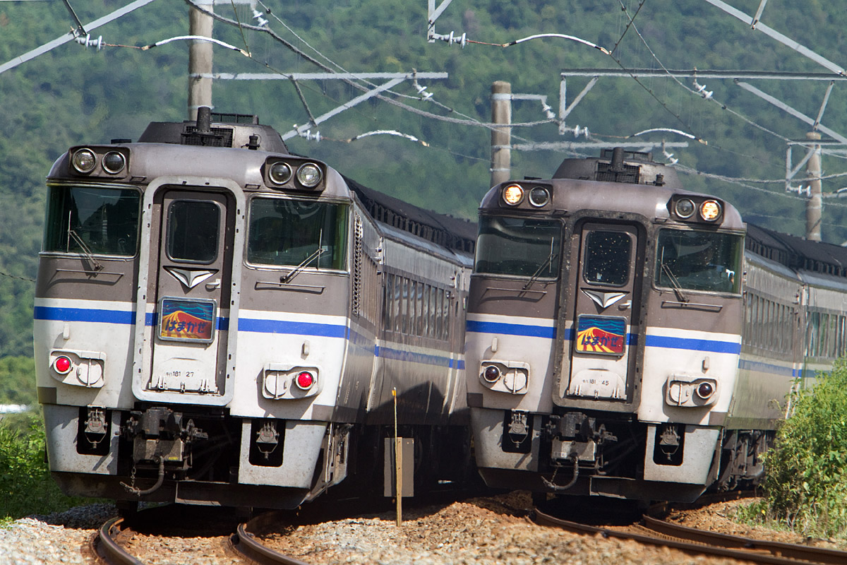 キハ181系時代の交換風景